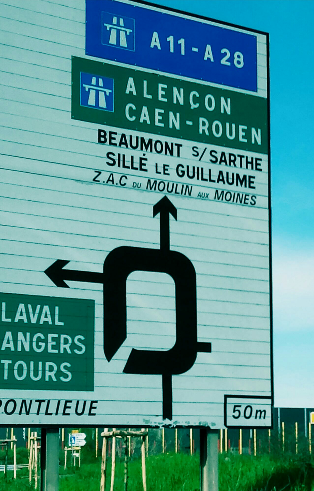 Panneau du rond-point de Beauregard au Mans